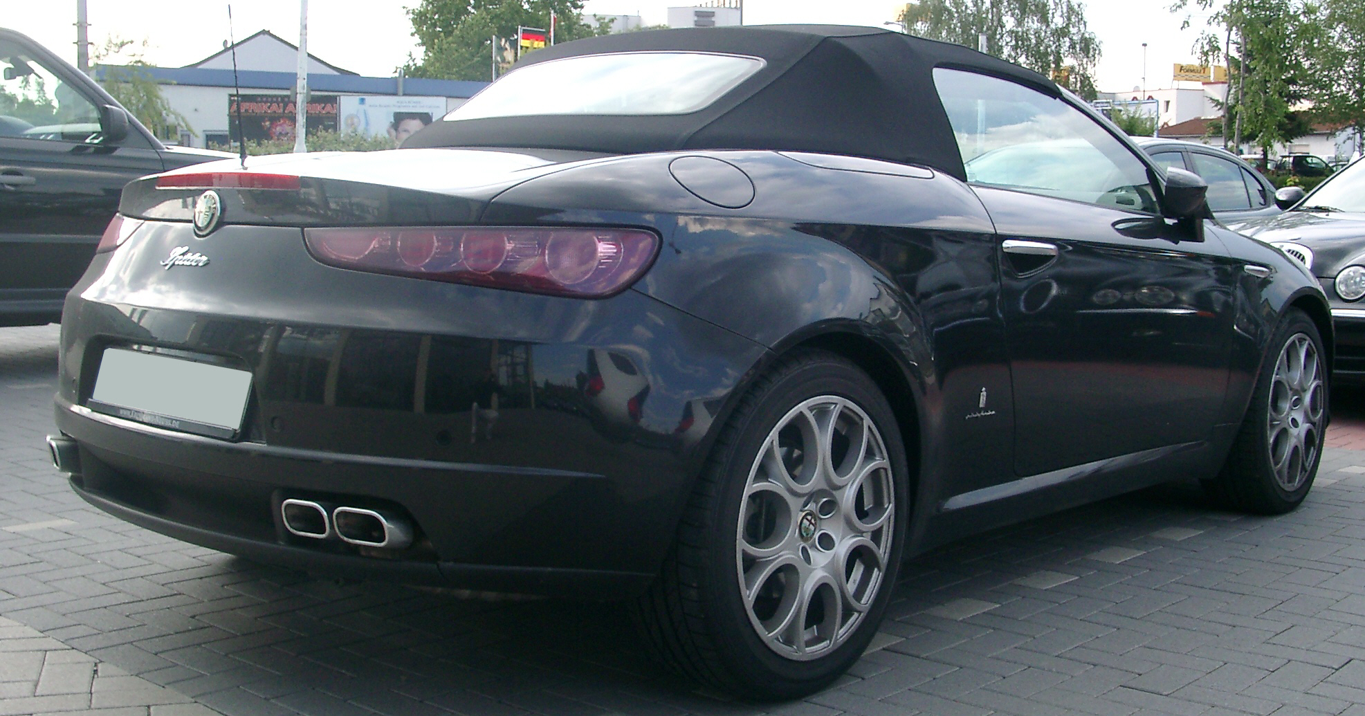 Alfa Romeo Spider 939 (6. Generation)